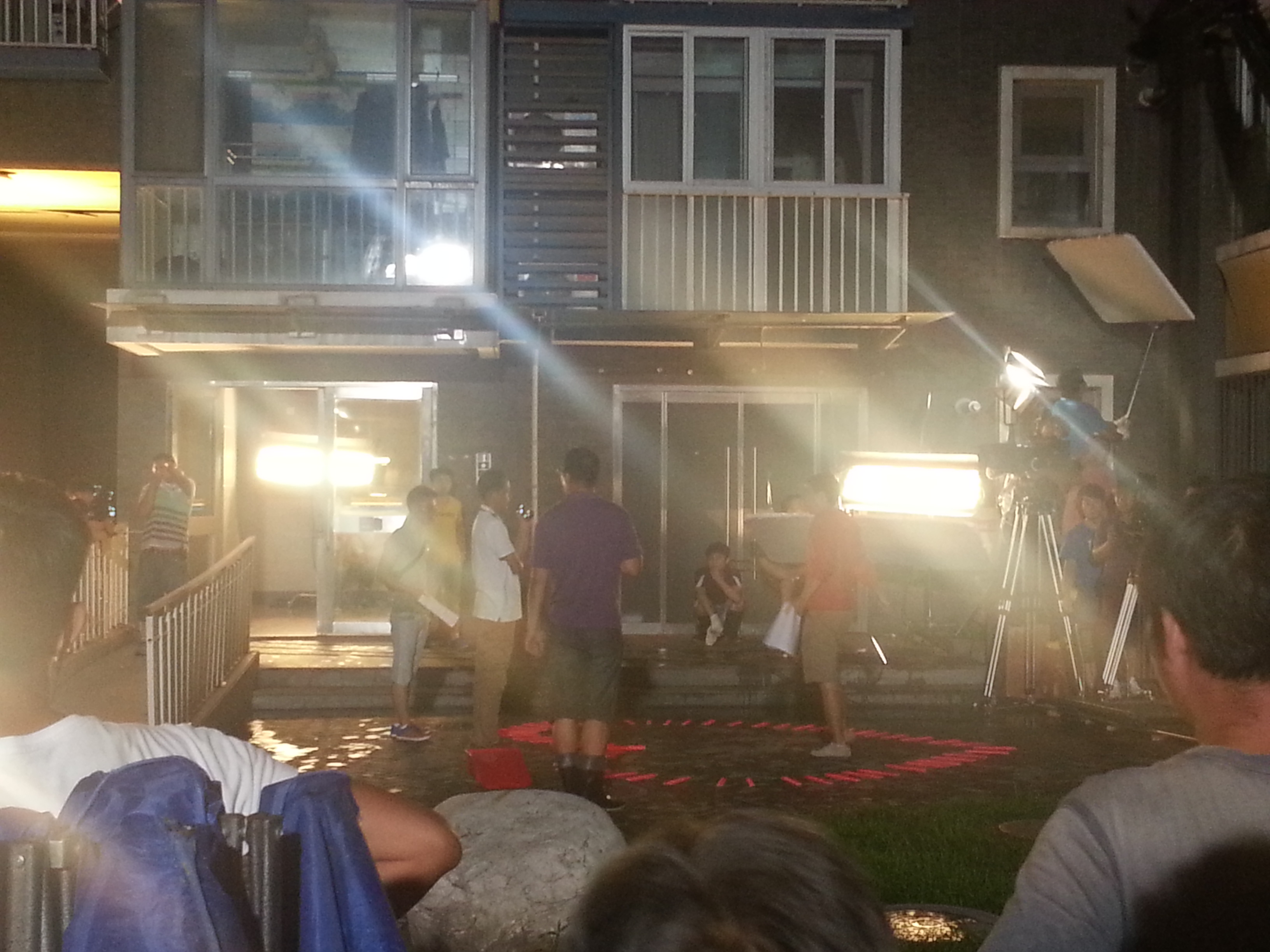 夏夜，望京某小区里，王志文正在拍演电视剧，居民边乘凉边欣赏，这样的场景望京的每个人可能都见过